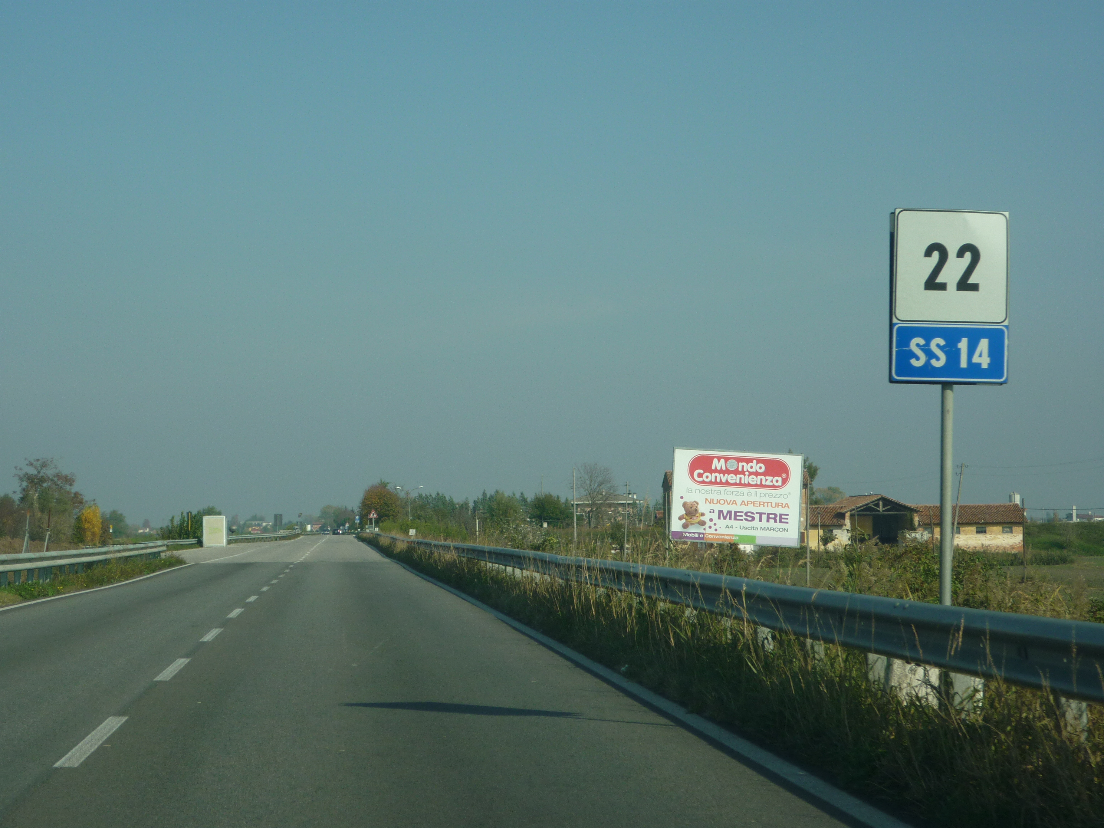 SS14